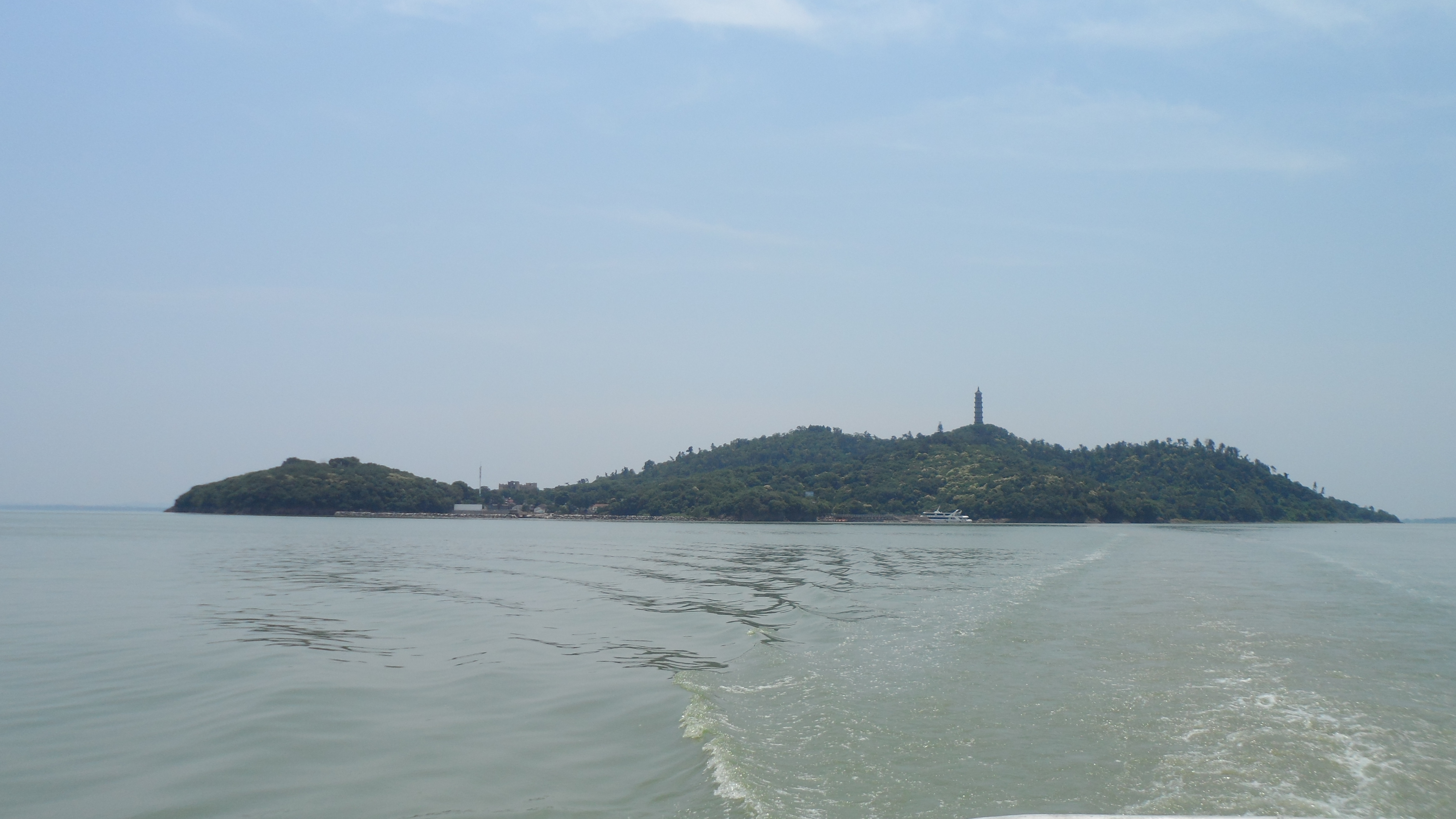 安徽巢湖姥山岛